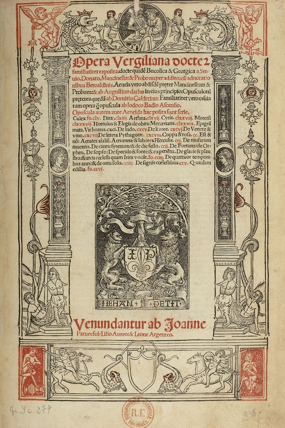 Opera Vergiliana ed. Josse Bade 1512 title page